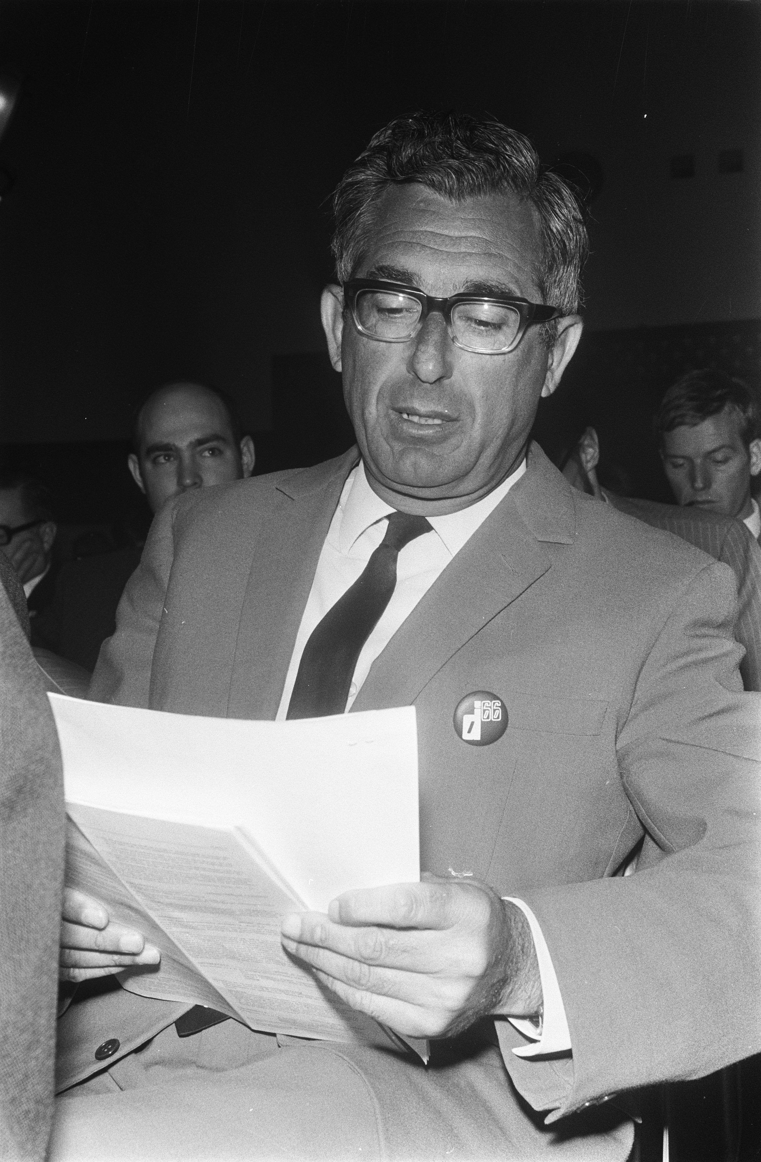 Collectie / Archief : Fotocollectie Anefo Reportage / Serie : [ onbekend ] Beschrijving : Partijcongres van D66 in Rotterdam; dhr. Bert Schwarz, voorzitter van de Landelijke Werkgroep Bevolkingspolitiek Datum : 3 april 1970 Locatie : Rotterdam, Zuid-Holland Trefwoorden : conferenties, politici Persoonsnaam : Schwarz, N.F.I. Instellingsnaam : D66 Fotograaf : Koch, Eric / Anefo Auteursrechthebbende : Nationaal Archief Materiaalsoort : Negatief (zwart/wit) Nummer archiefinventaris : bekijk toegang 2.24.01.05 Bestanddeelnummer : 923-4033